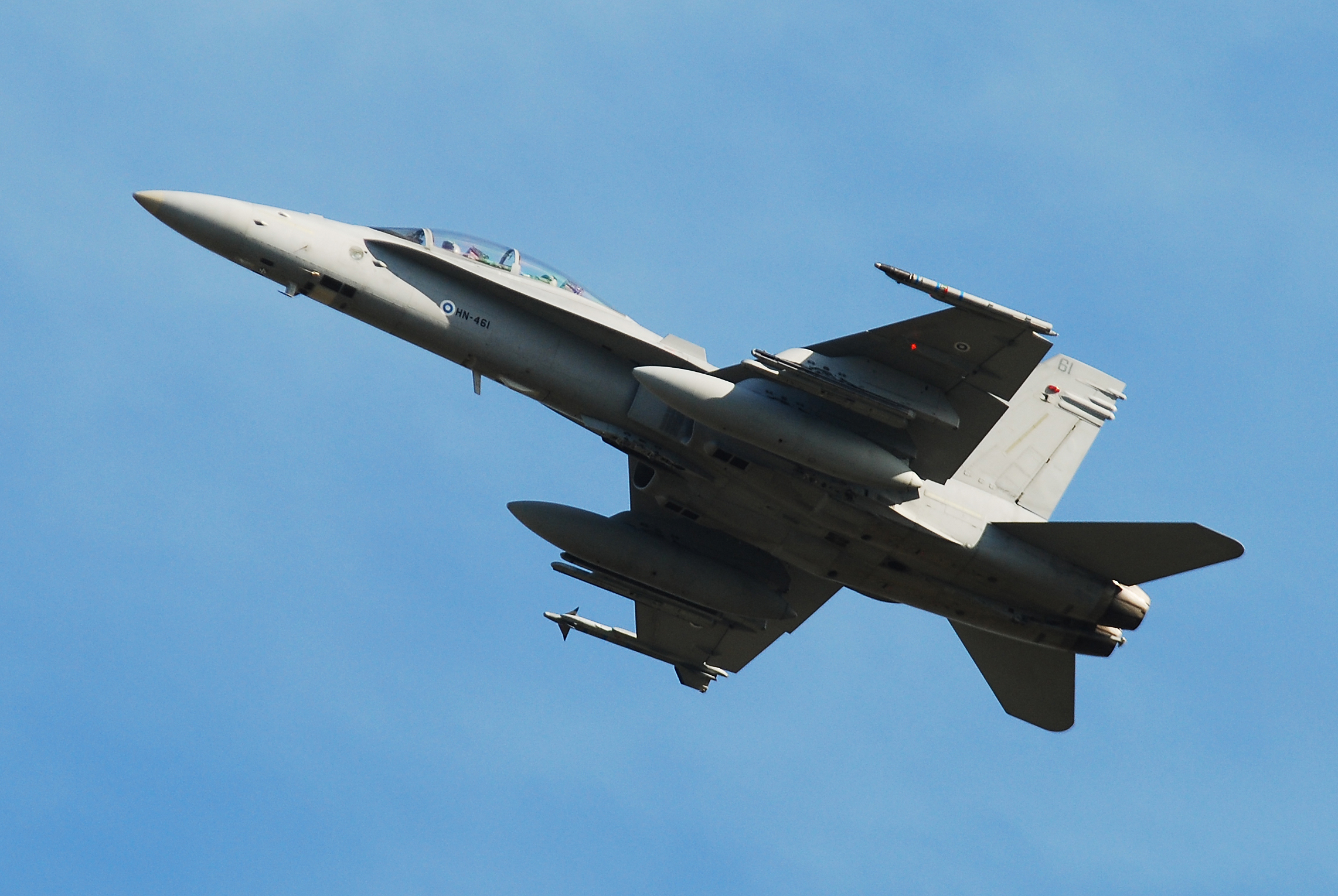 imx00000382